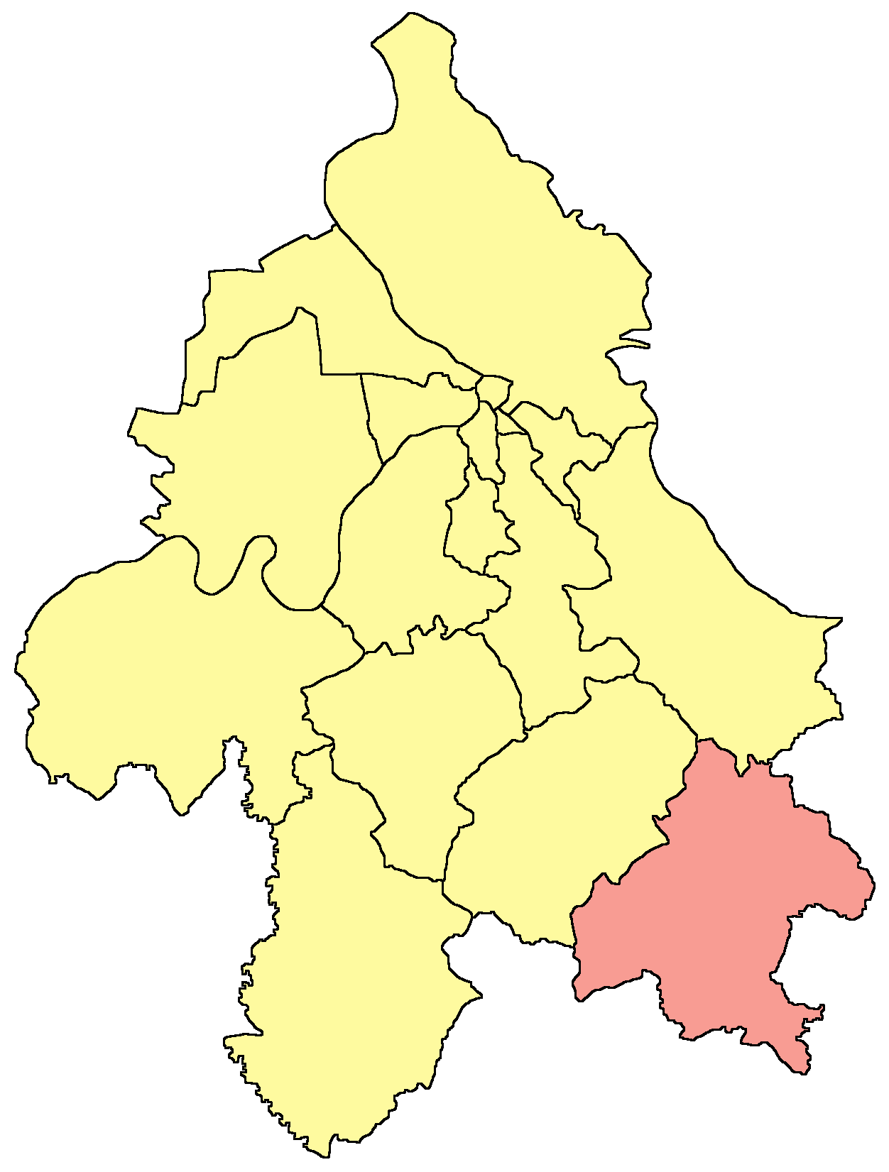 Belgrade municipality map